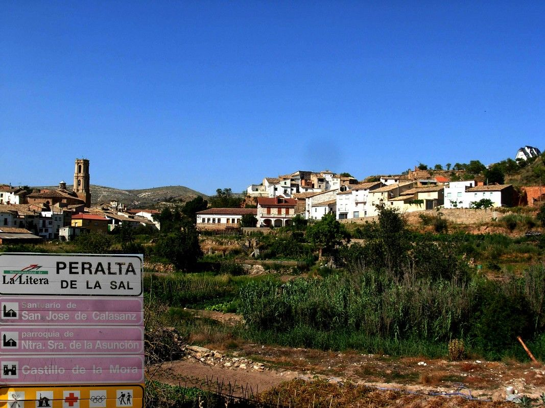 vista parcial de Peralta de la Sal (HU)Spain